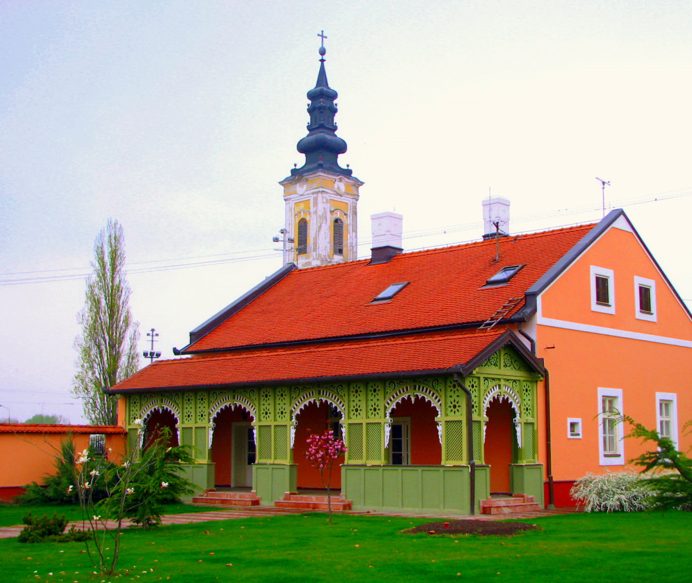 Patrijaršijski dvor-ljetna rezidencija srpskog patrijarha